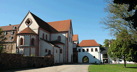 Die Basilika Hl. Kreuz in Wechselburg